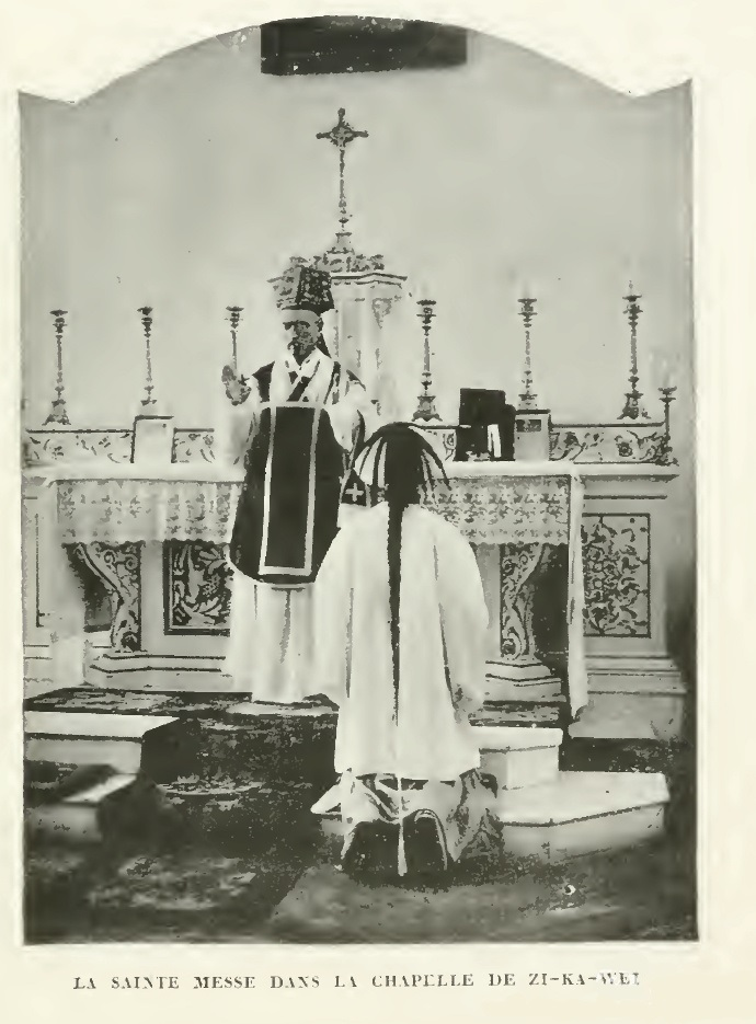 LA SAINTE MESSE DANS LA CHAPELLE DE ZI-KA-WEI